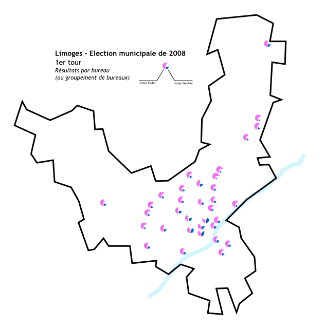 Résultats par bureau de l'élection municipale de 2008 à Limoges